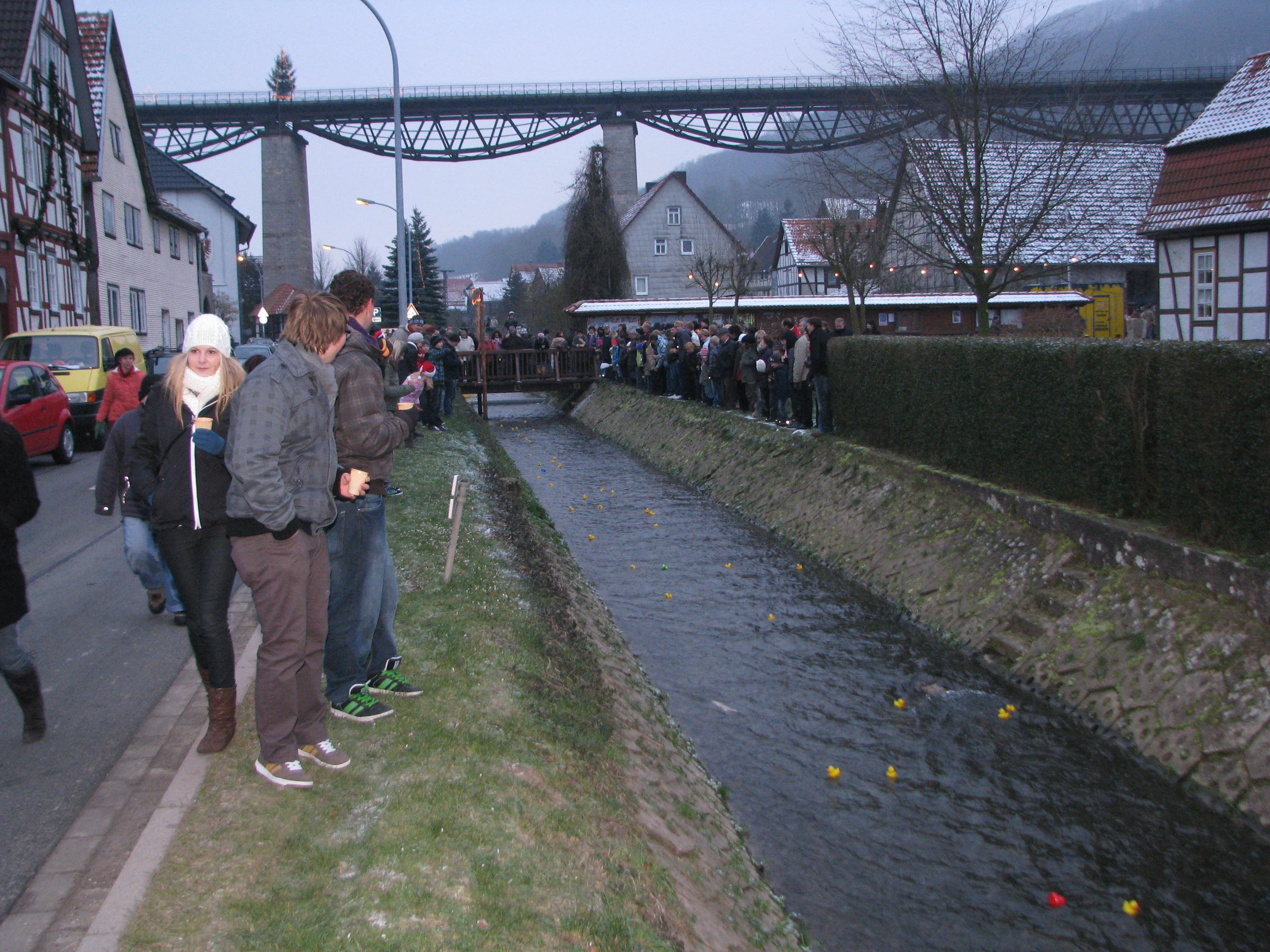 Die Frieda in Lengenfeld/Stein (Eichsfeld) während des Entenrennens am 1. Advent 2010. Im Hintergrund der Eisenbahnviadukt.